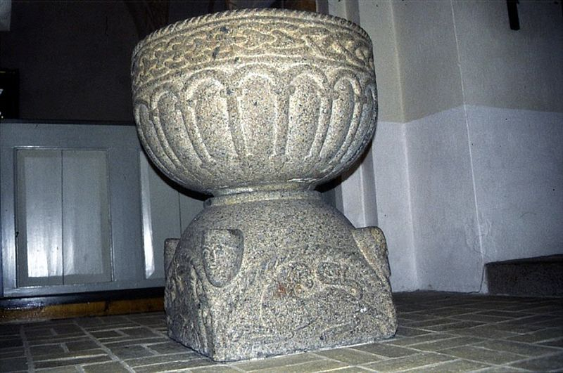 Vejerslev Kirke, Favrskov Kommune, døbefont